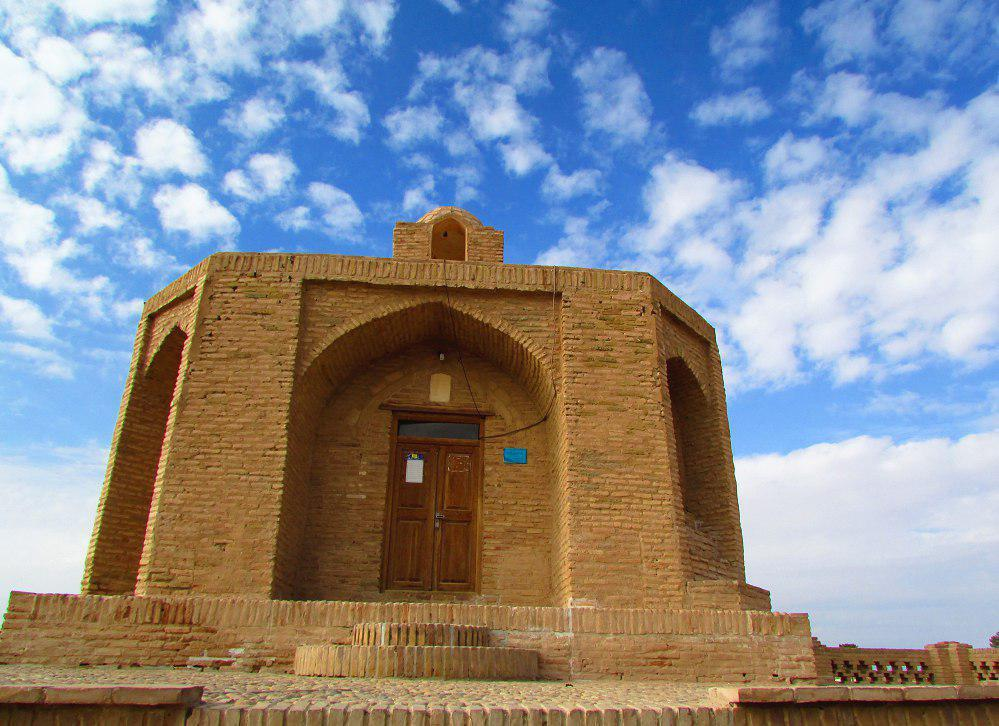 آرامگاه ابن حسام خوسفی عکس: مصطفی علیزاده 1396